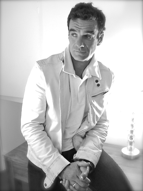 Philippe Audibert